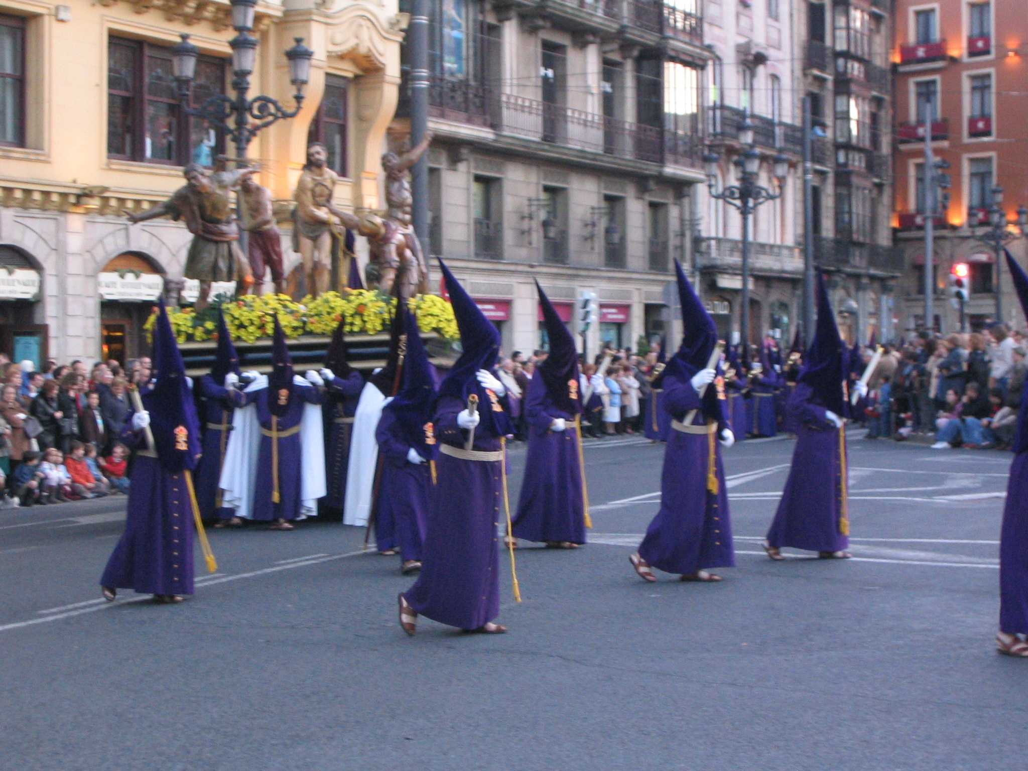 Procesión de Jueves Santo en Bilbao, Vizcaya, País Vaco, España.